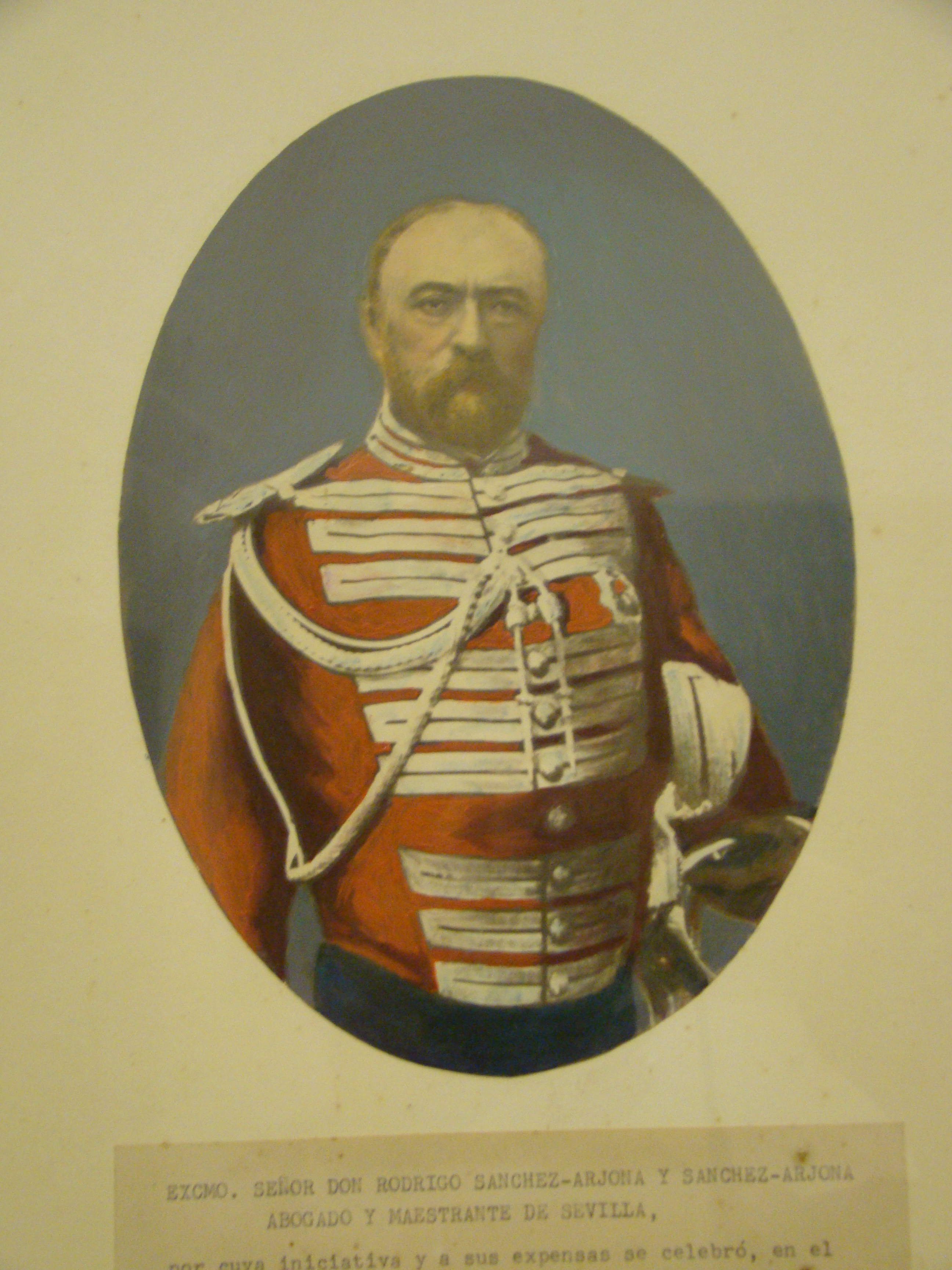 Retrato de Rodrigo Sanchez-Arjona